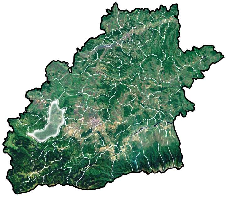 Saliste jud Sibiu.